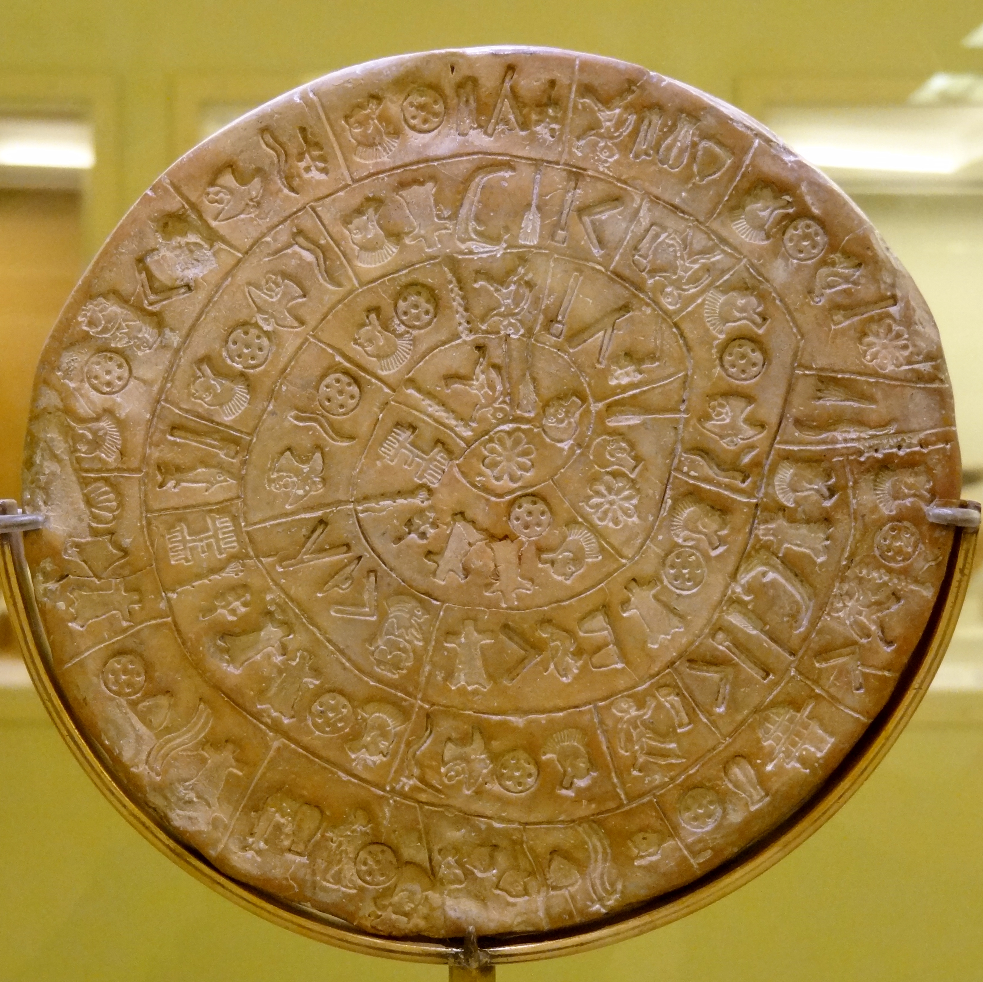 Der am 3. Juli 1908 in der Ausgrabungsstätte von Phaistos gefundene Diskos von Phaistos (Seite A), ausgestellt im Archäologischen Museum Iraklio, Kreta, Griechenland